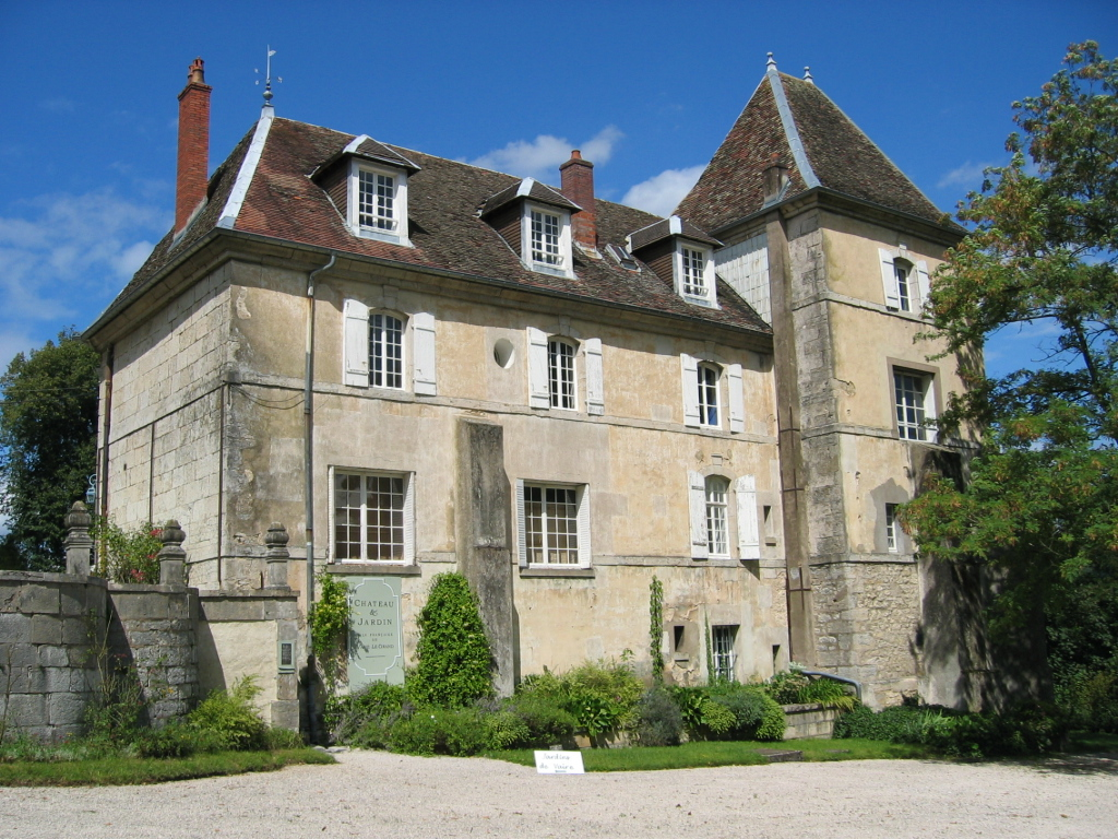 Château & Jardins de Vaire-Le-Grand - Franche Comté - France